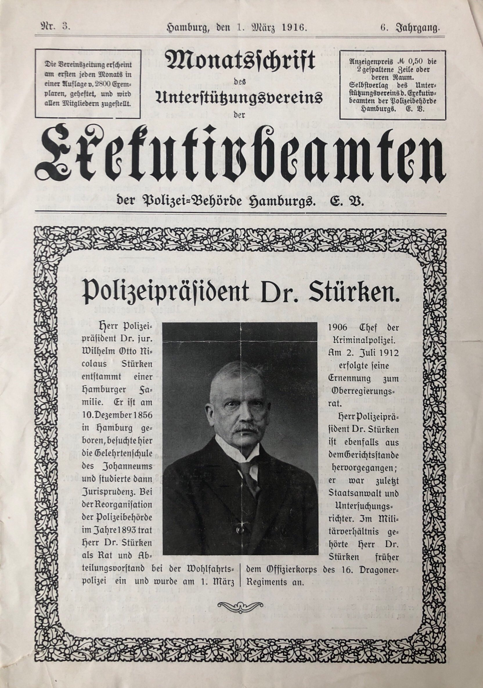 Titelseite der Monatsschrift des Unterstützungsvereins der Exekutionsbeamten der Polizei-Behörde Hamburgs e.V., Nr. 3, 1916.